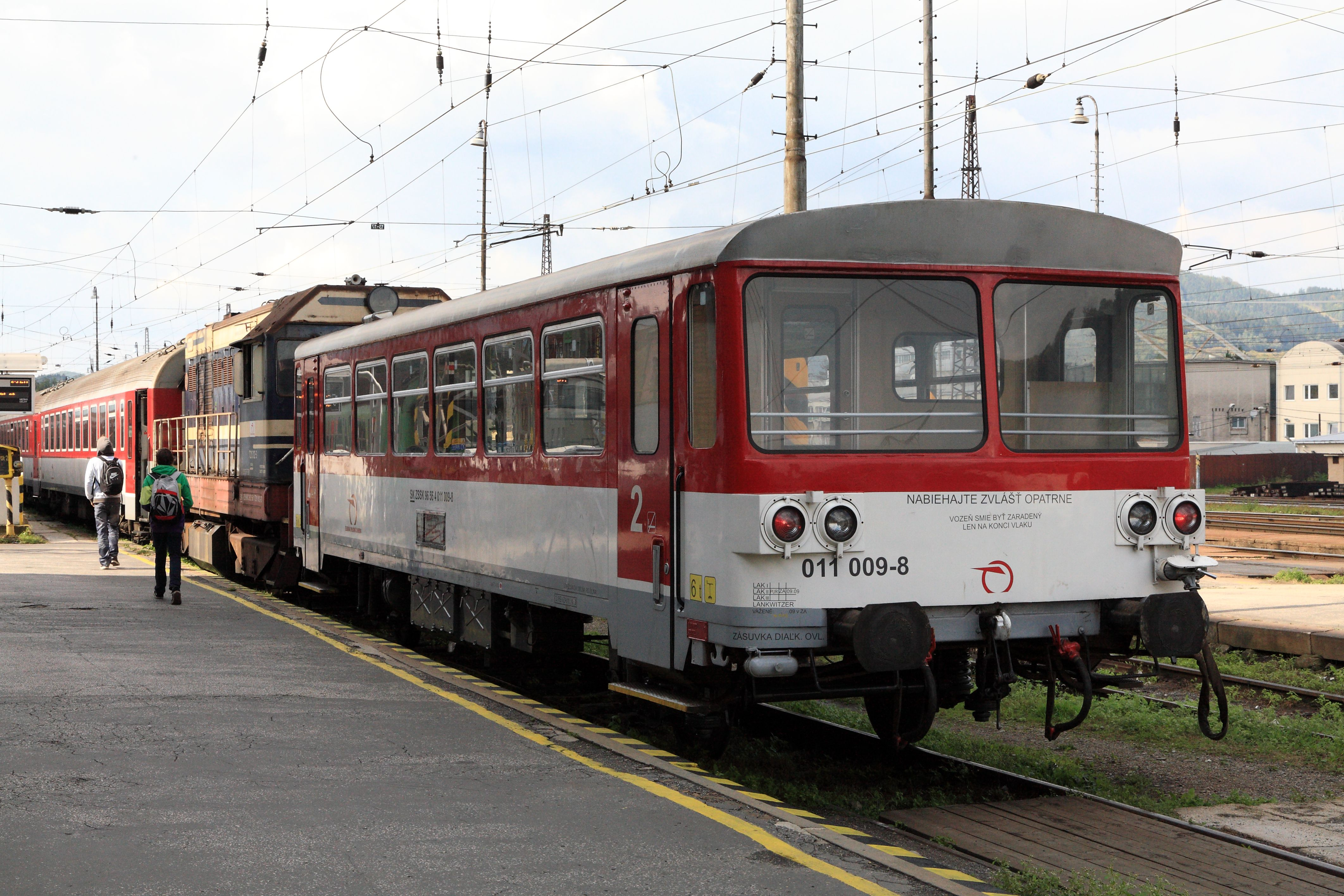 teilmodernisierter Beiwagen für Triebwagen der Reihe 810/811